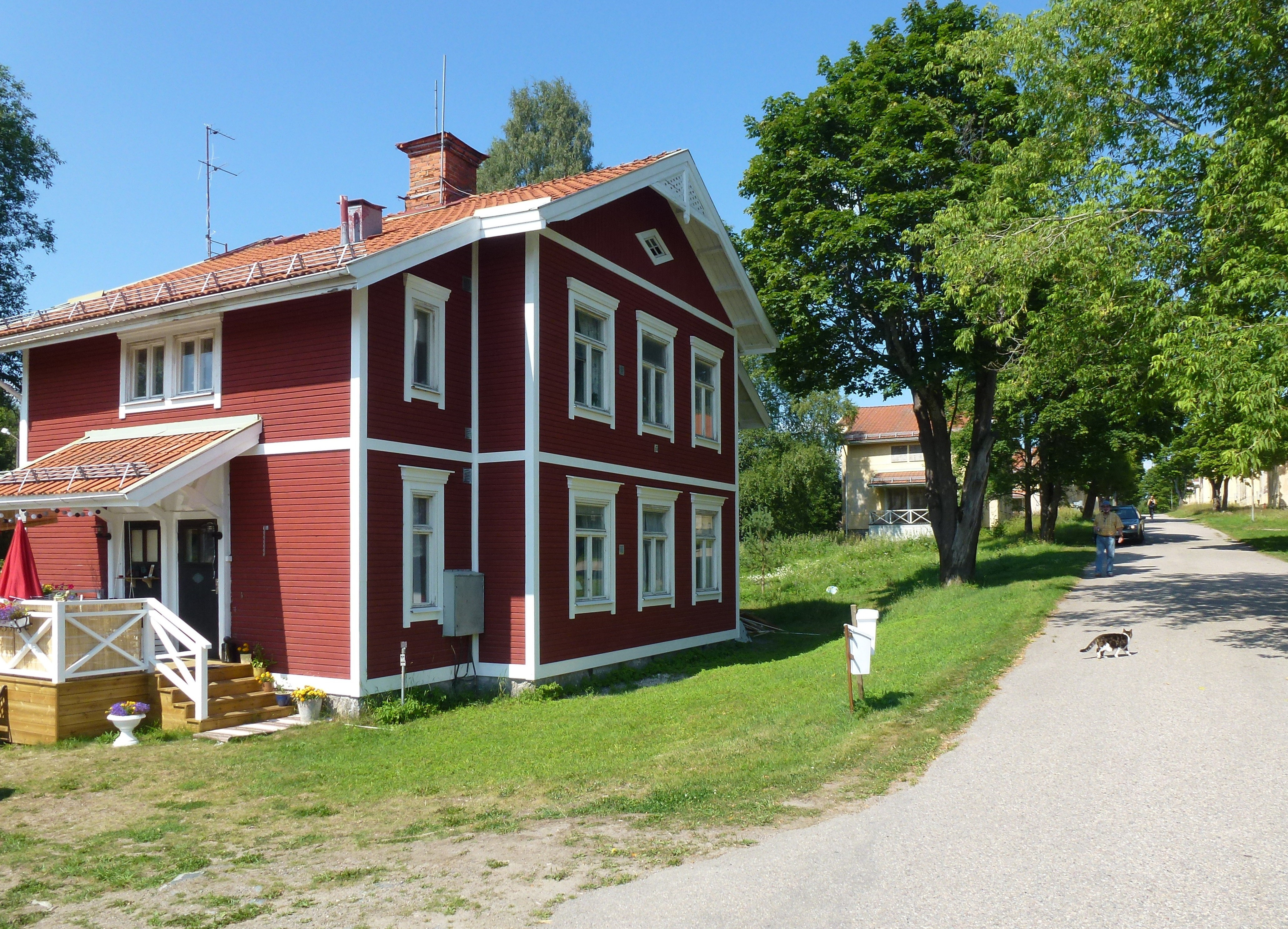 Upprustning av bostadsområdet "Källfallet" i Grängesberg